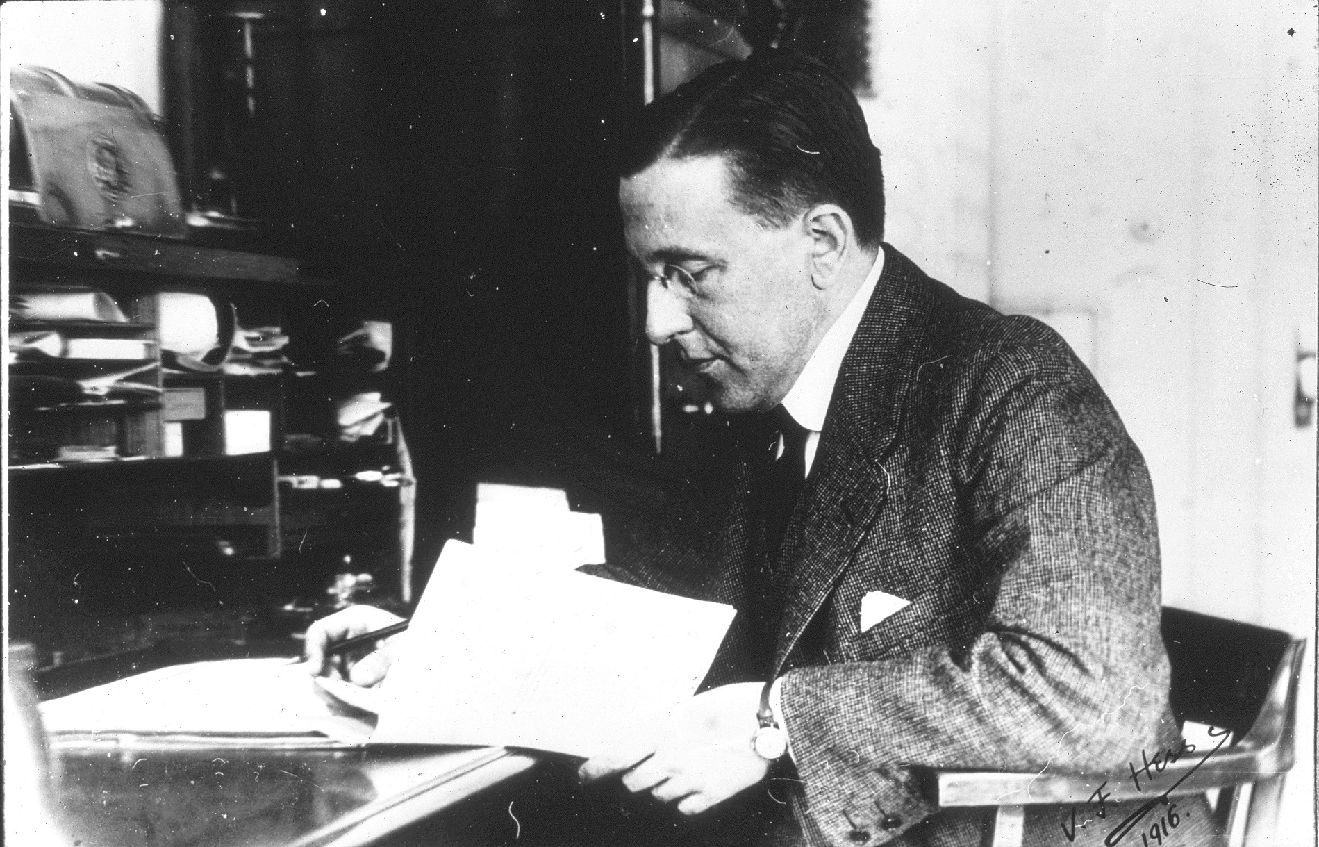 Viktor Hess im Jahr 2016